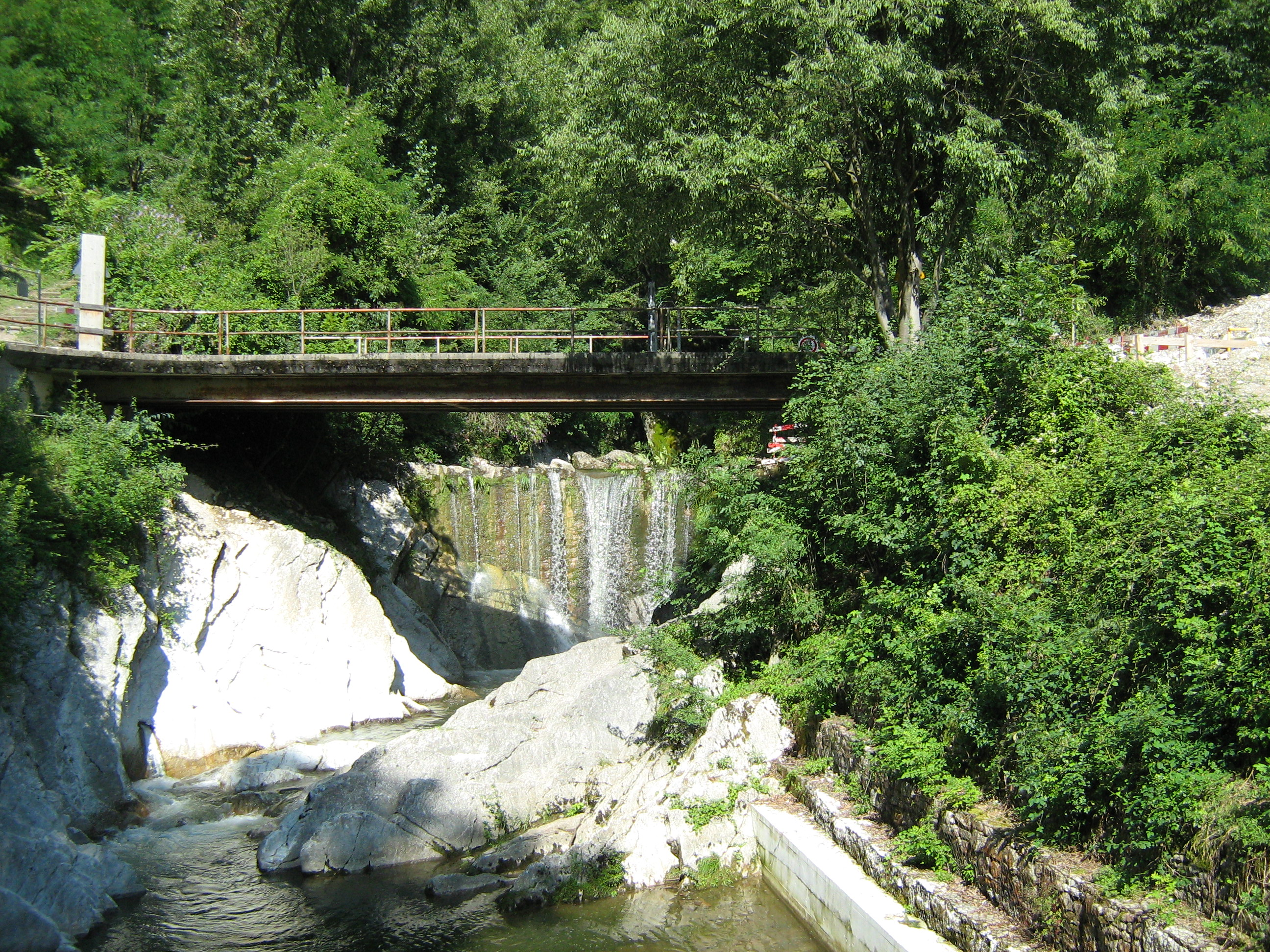 Punt dala Ciüsa, Parco delle Gole della Breggia